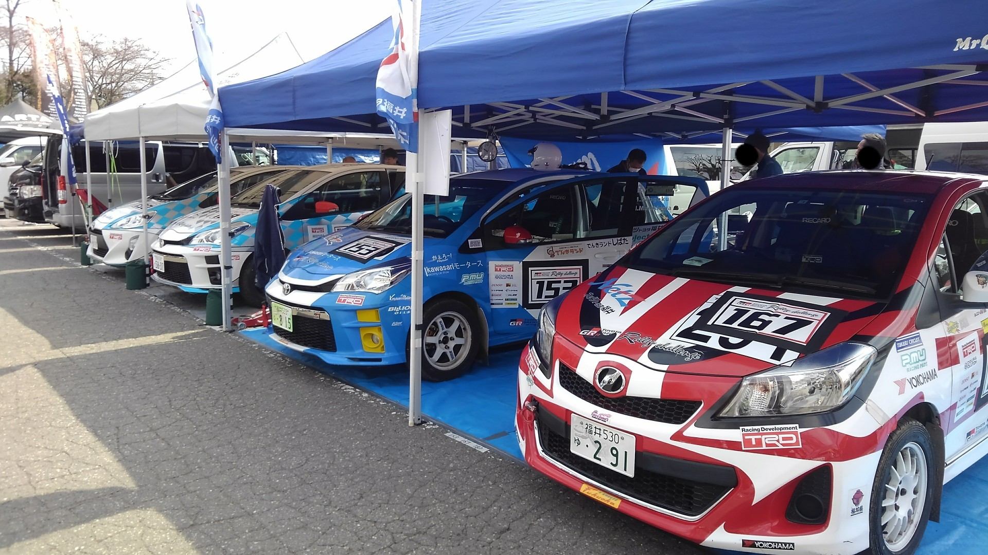 2019年TGRラリーチャレンジ茅野八ヶ岳のサービスパーク